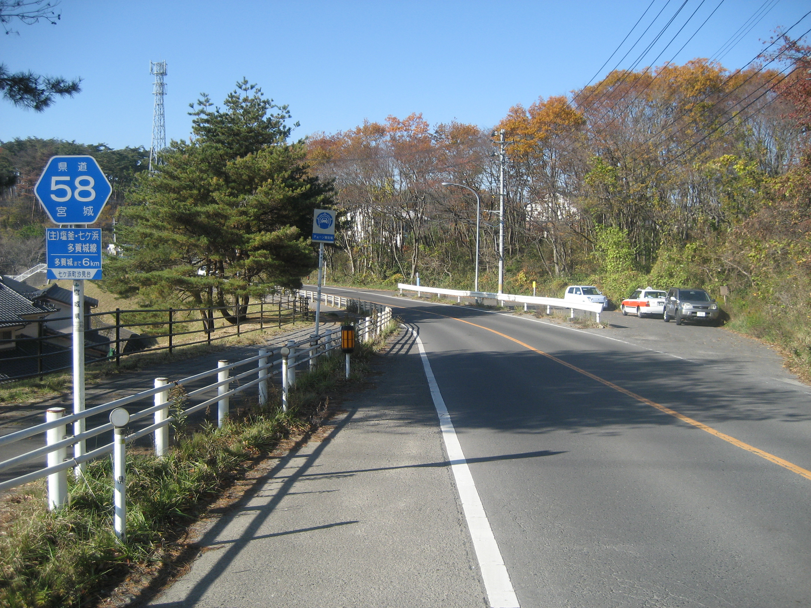 宮城県道58号線七ヶ浜町汐見台付近（塩釜方面を撮影）